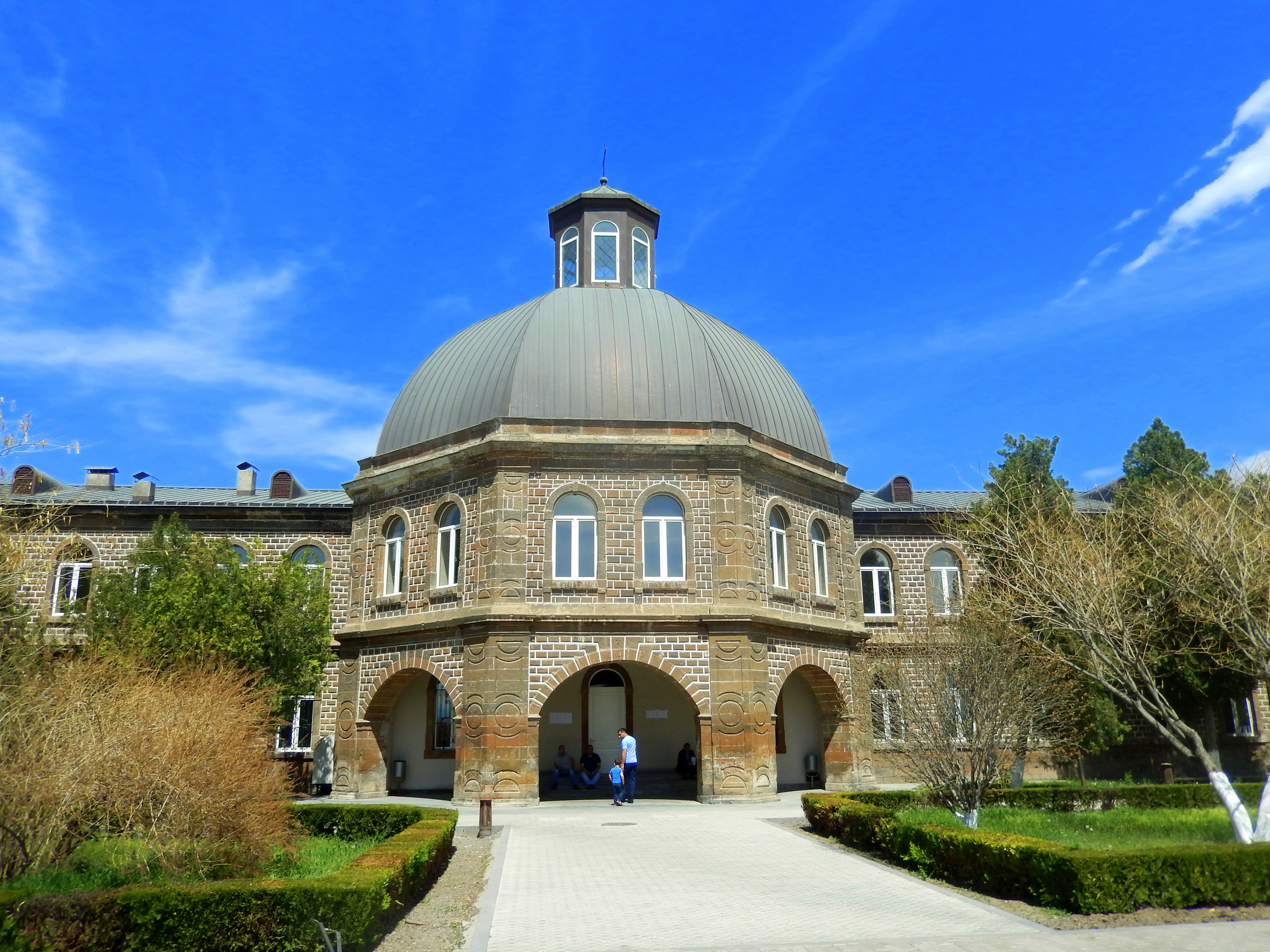 Գևորգյան ճեմարան 2/14